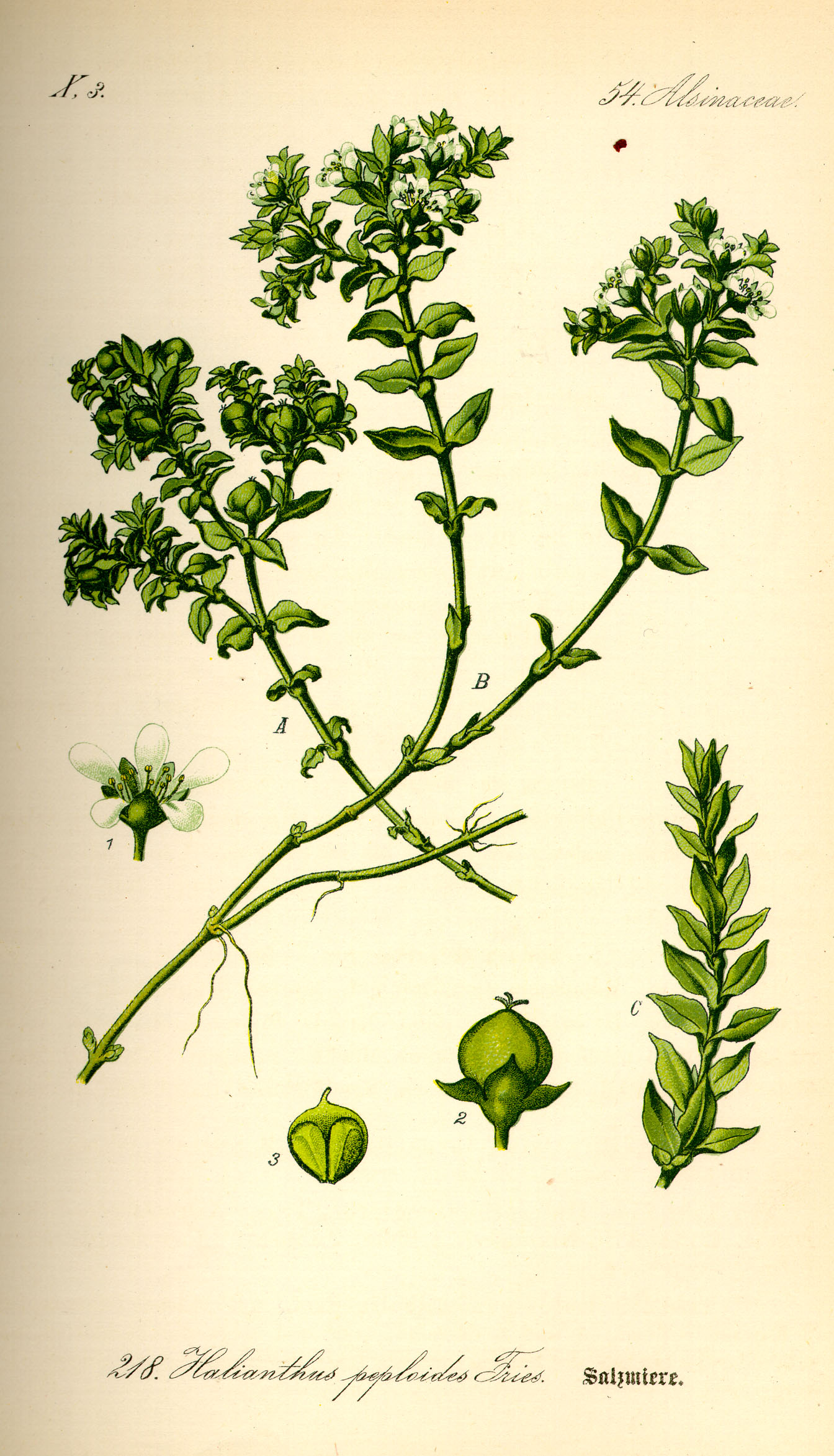 Honckenya peploides